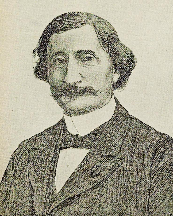 H.J. Schimmel (1823-1906); Nederlands dichter en toneelschrijver